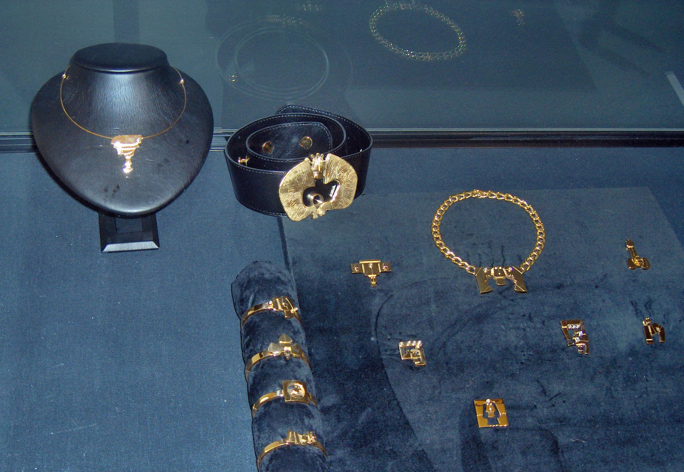 Juwelen : gouden hangers, armbanden, riembeugel en gouden reliëfs